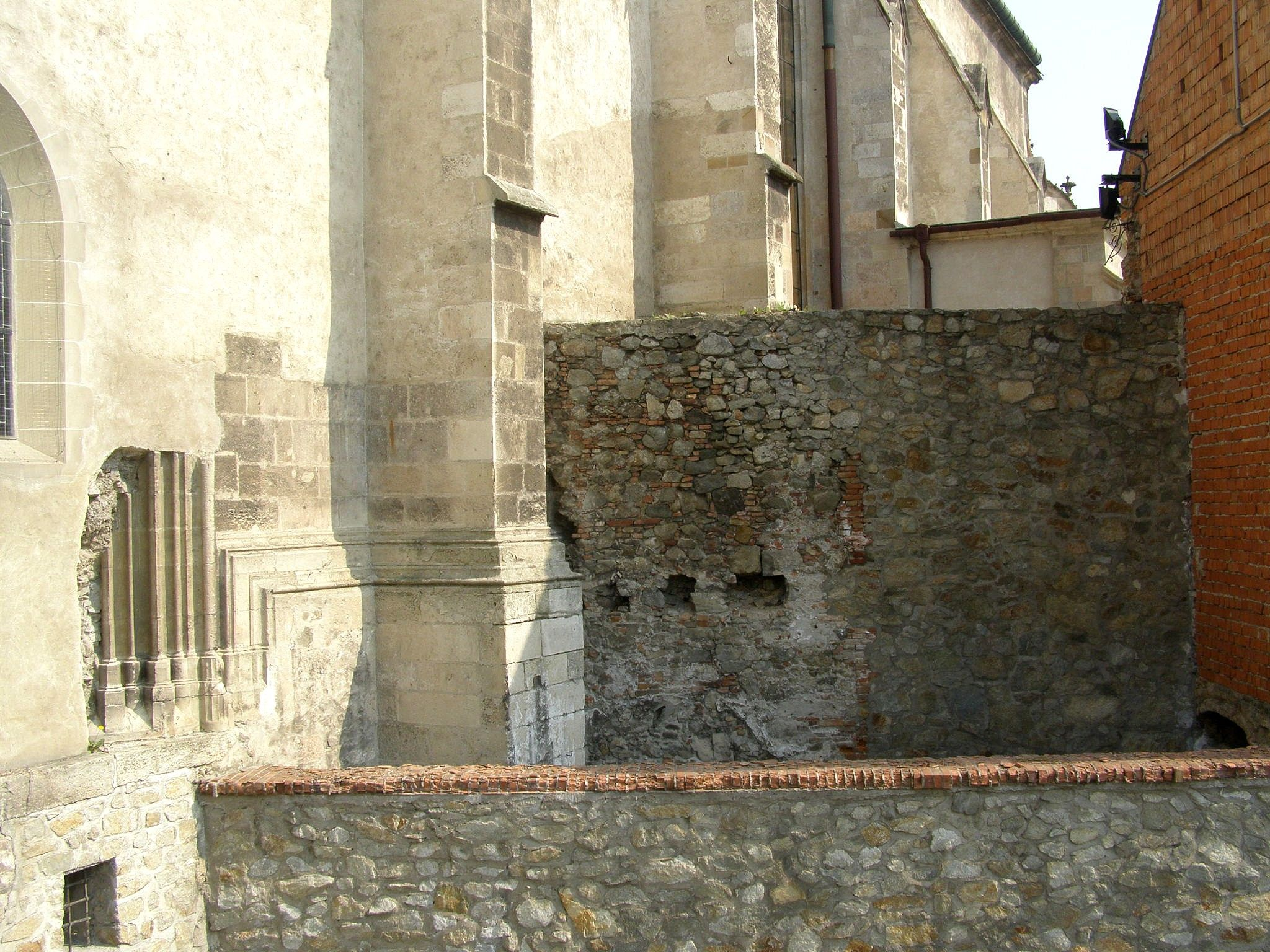 Južná fasáda katedrály s pozostatkom mestského opevnenia